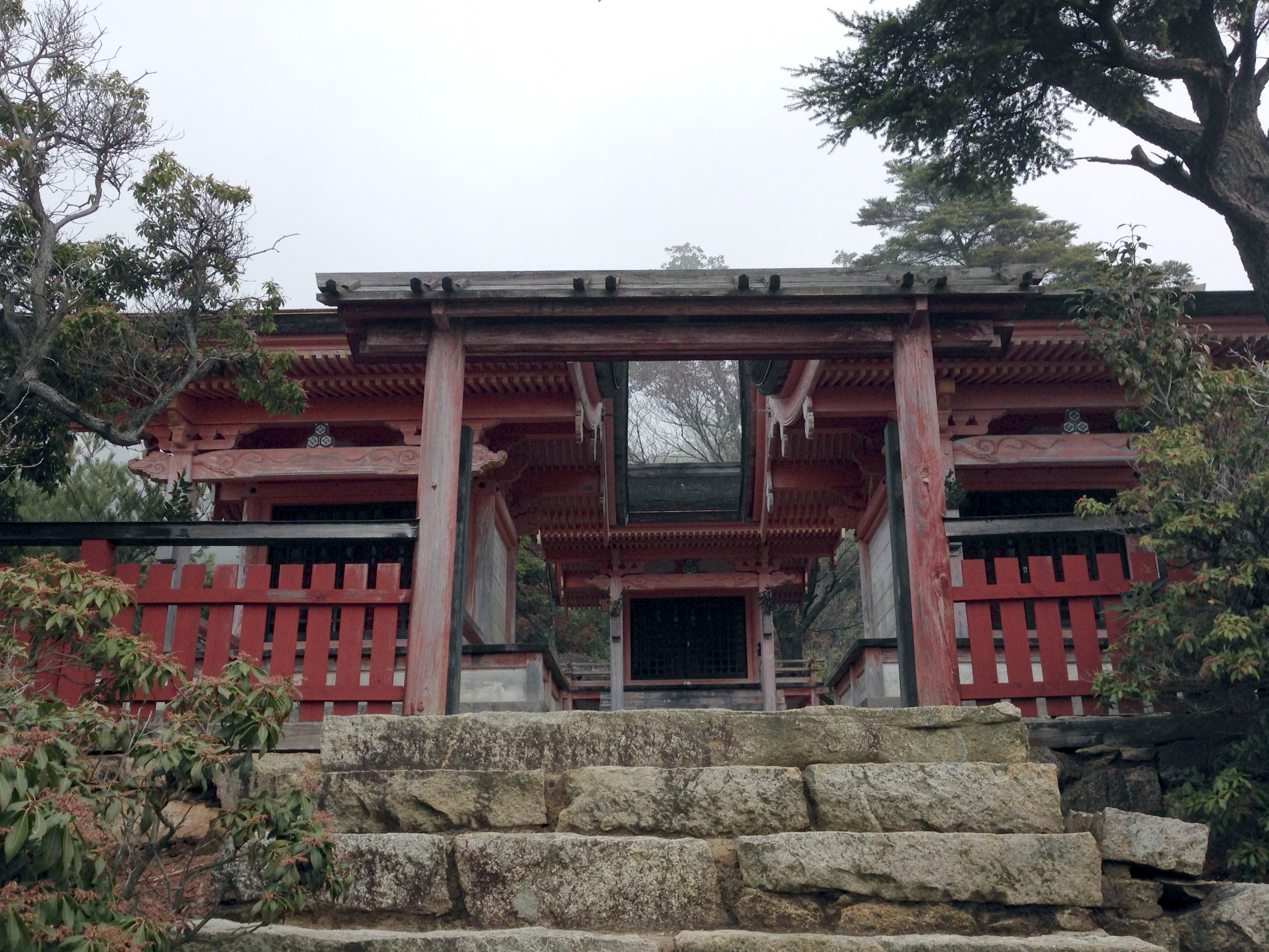 御山神社（広島県廿日市市宮島町）